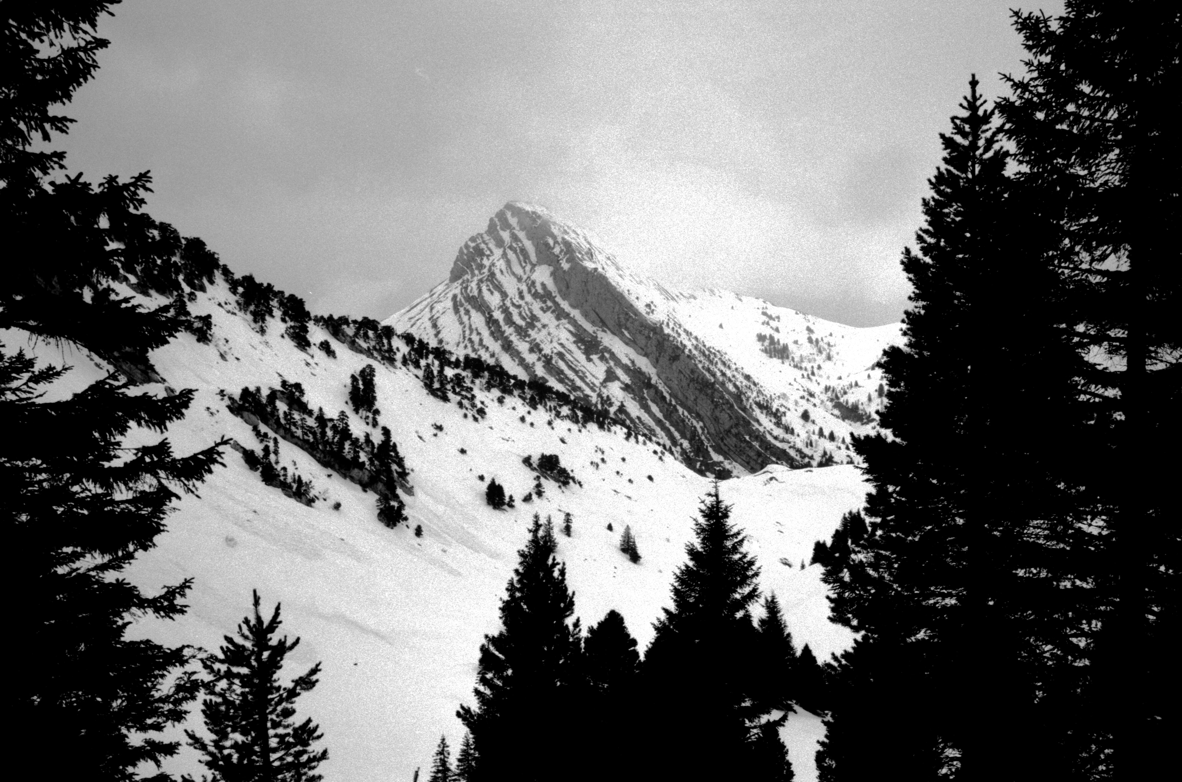 La Grande Sure in winter